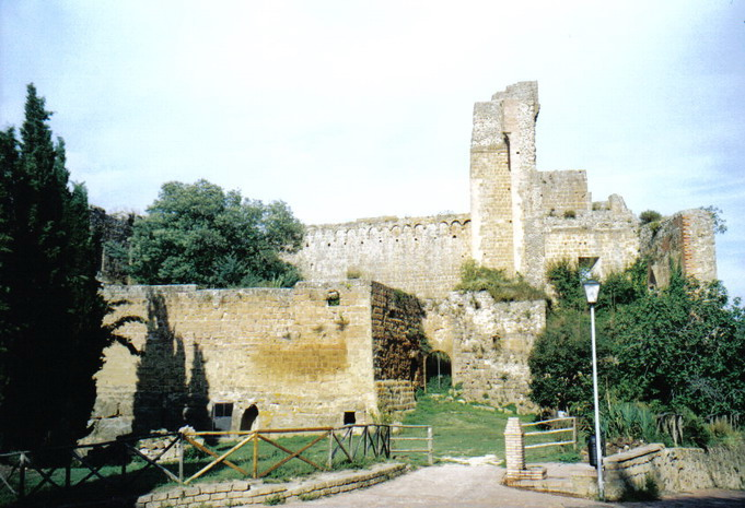 descrizione: Rocca Aldobrandesca di Sovana